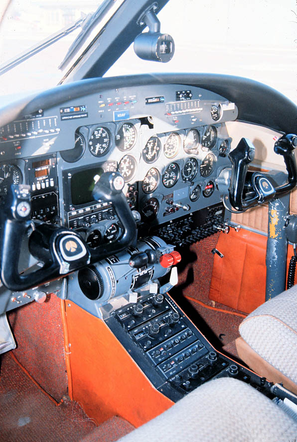 A cockpit